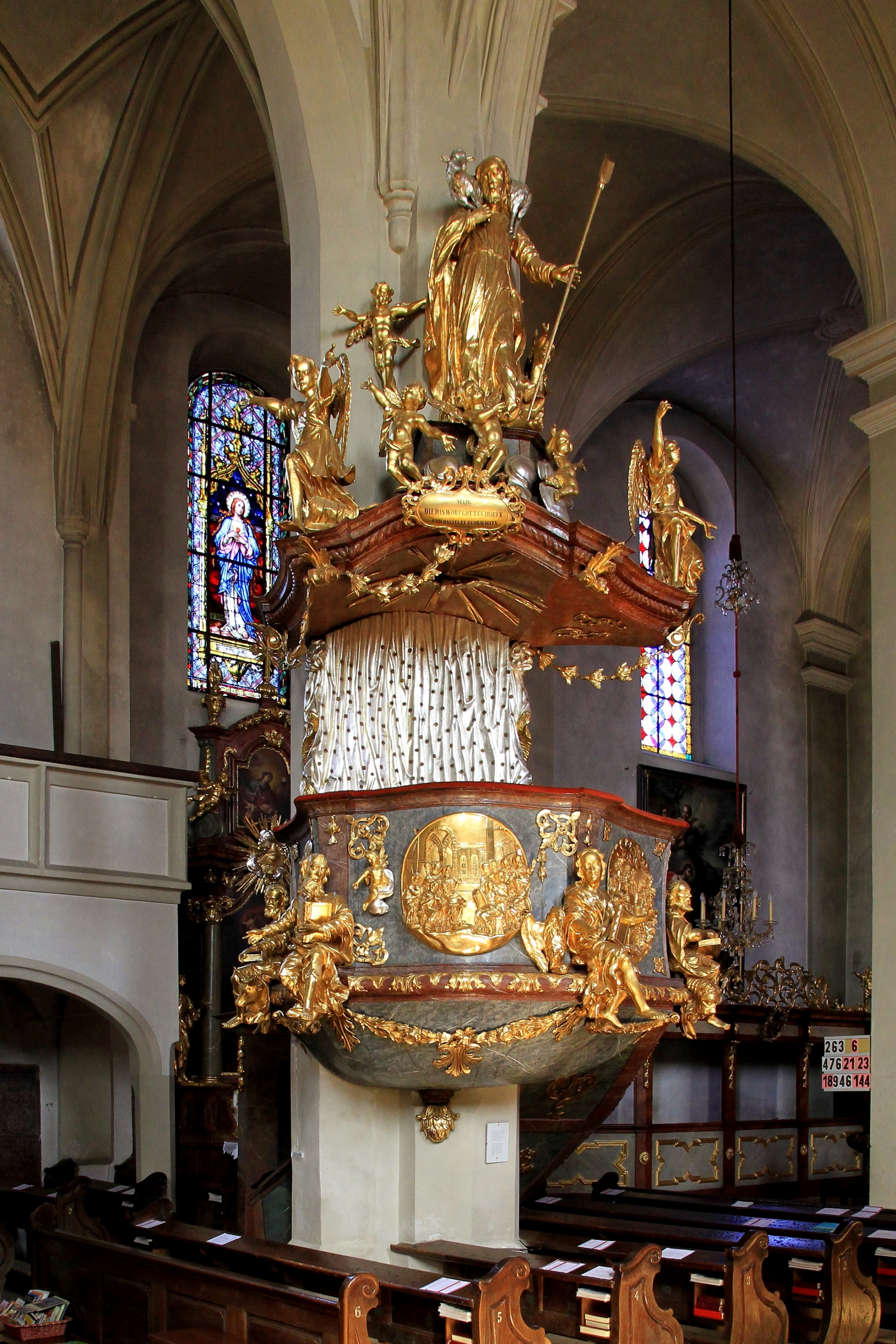 Kanzel der katholischen Pfarrkirche hl. Petrus in der niederösterreichischen Marktgemeinde Purgstall. Ein Werk, das um 1760 geschaffen wurde.